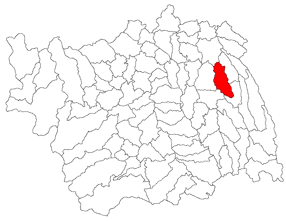 Categorie:Hărţi ale judeţului Bacău